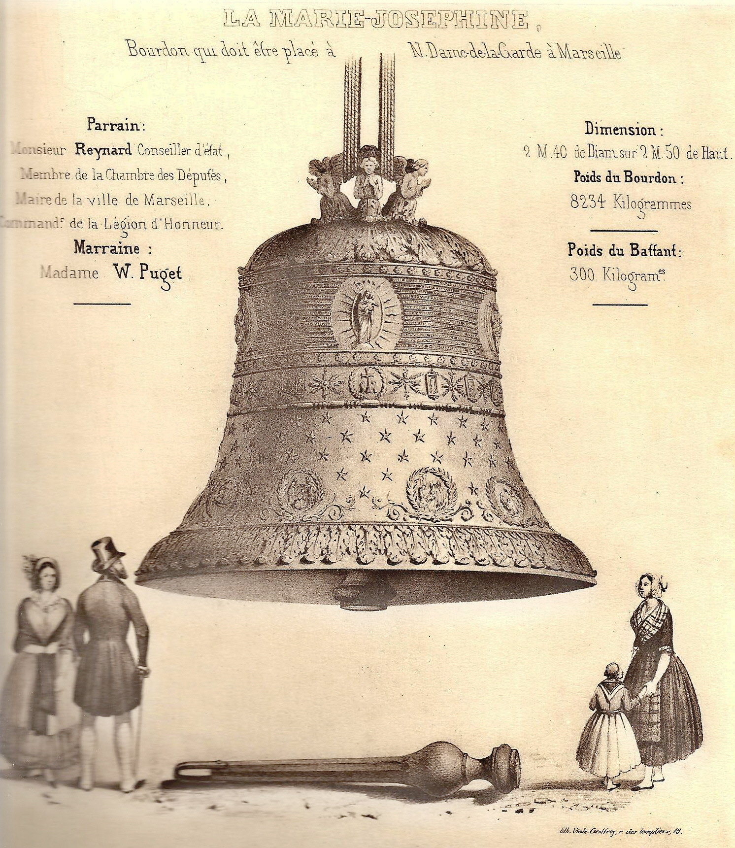 Lithographie de 1845 montrant le bourdon de Notre-Dame de la Garde à Marseille.